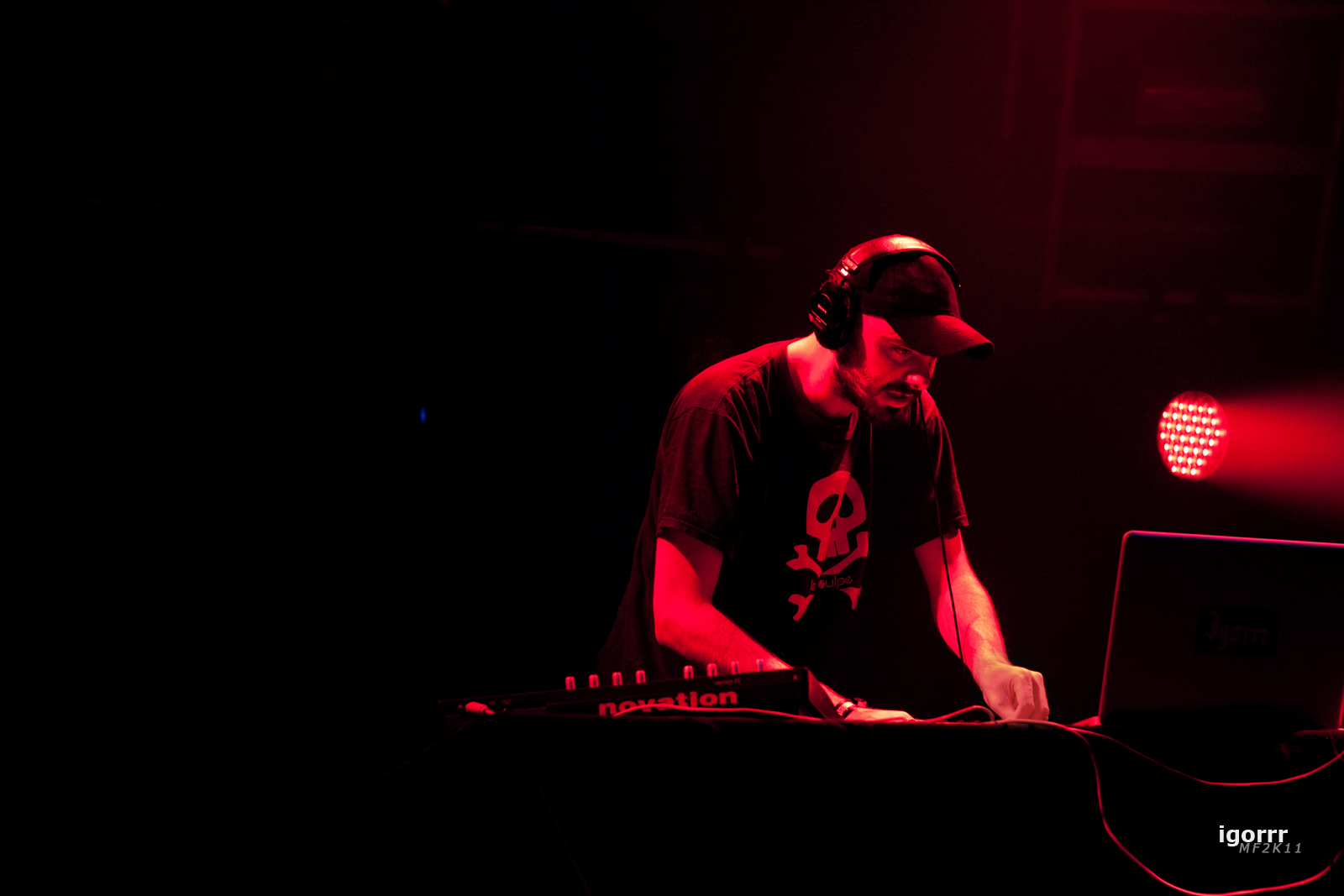 sIMG_0135igorrr